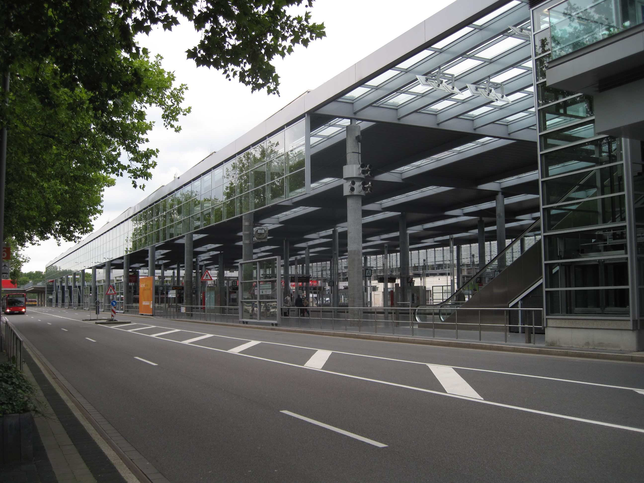 Düsseldorf, U-Bahnhof, Heinz-Ingenstau-Straße, Messe Nord/ESPRIT arena, früher auch LTU Arena. U-78 (=Linie 718 von 1981 bis 1988), Rheinbahn.